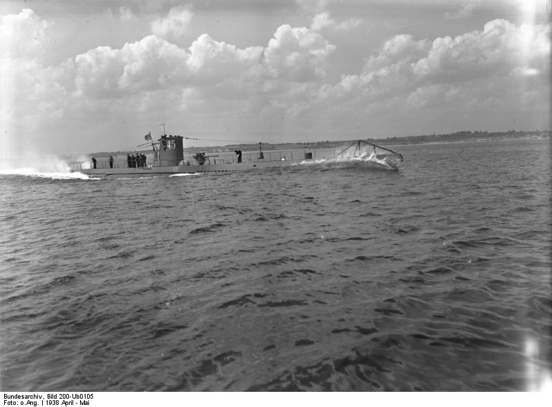 U-45 auf Meilenfahrt Meilenfahrt G.580 / U45 [U-Boot U-45.- Meilenfahrt vor Indienststellung.]